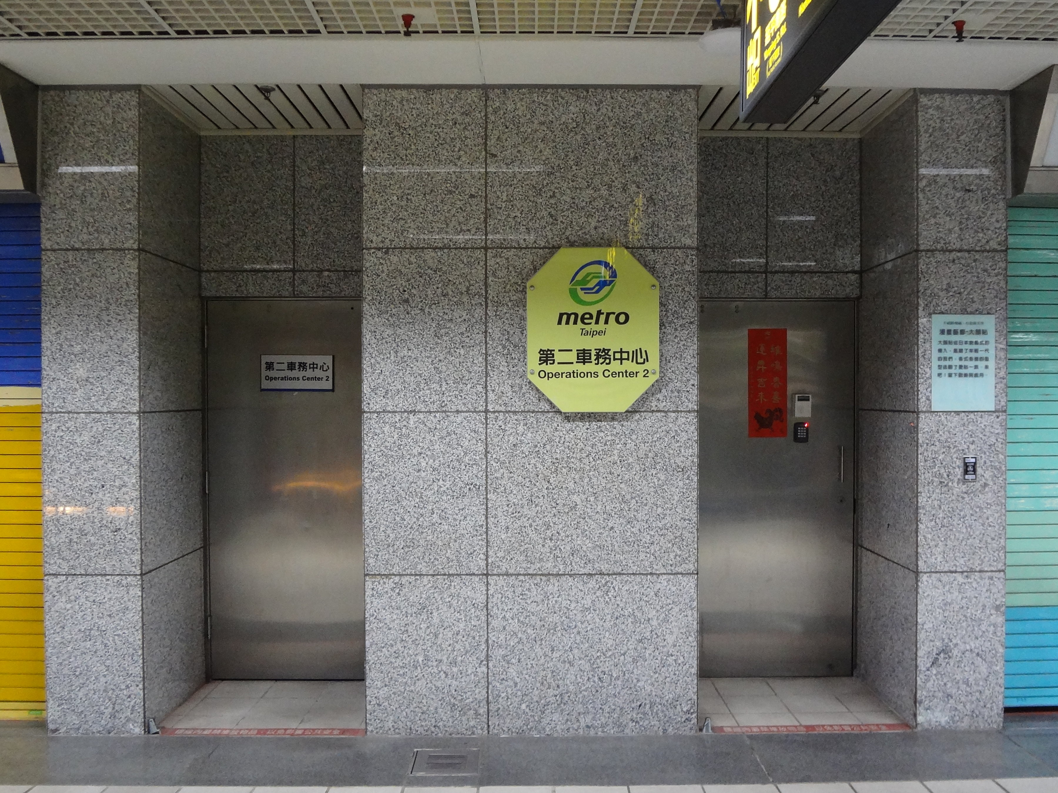 臺北捷運公司第二車務中心，位於西門地下街。